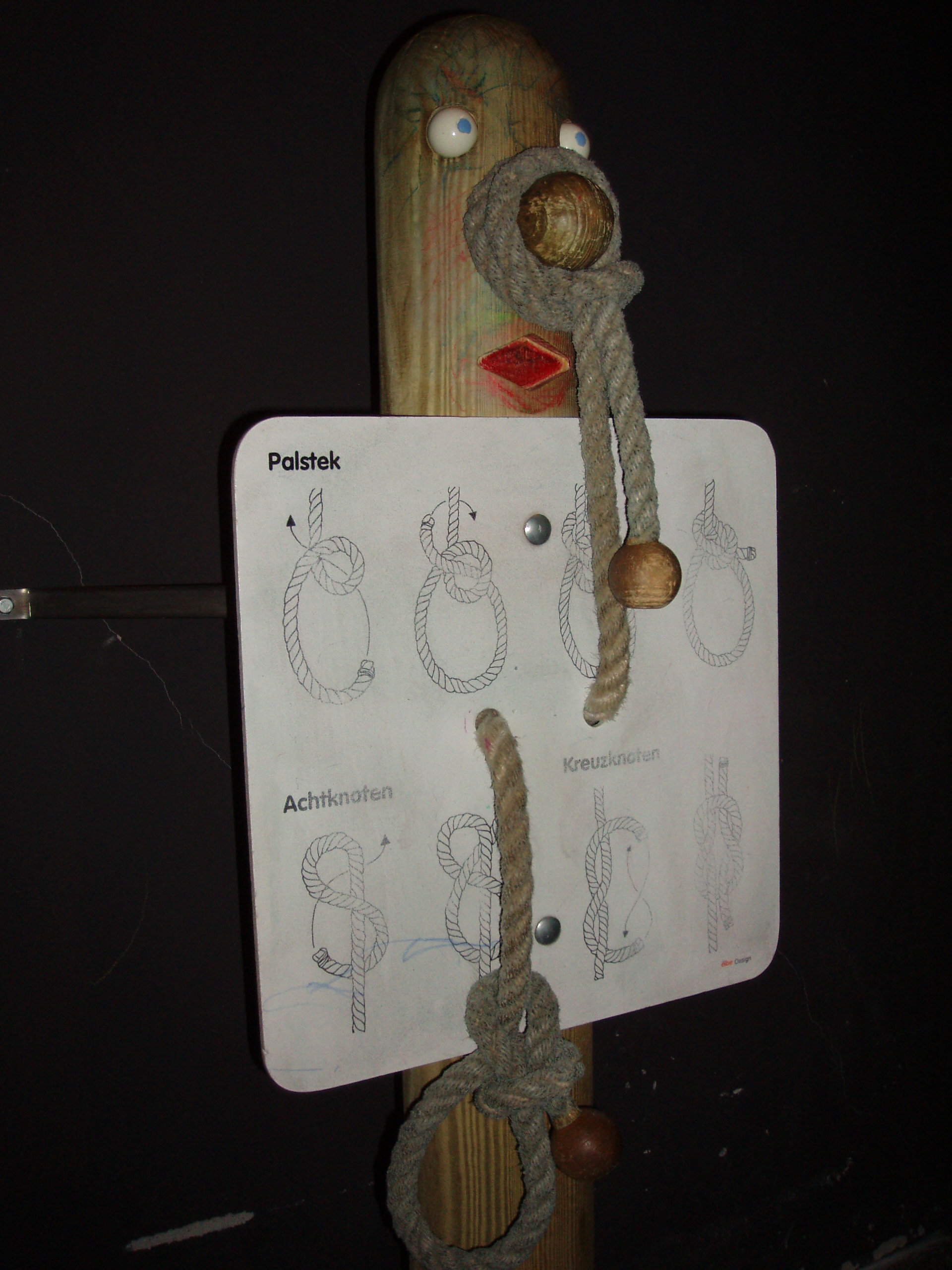 Übungsmöglichkeit im Atlanticum, Bremerhaven